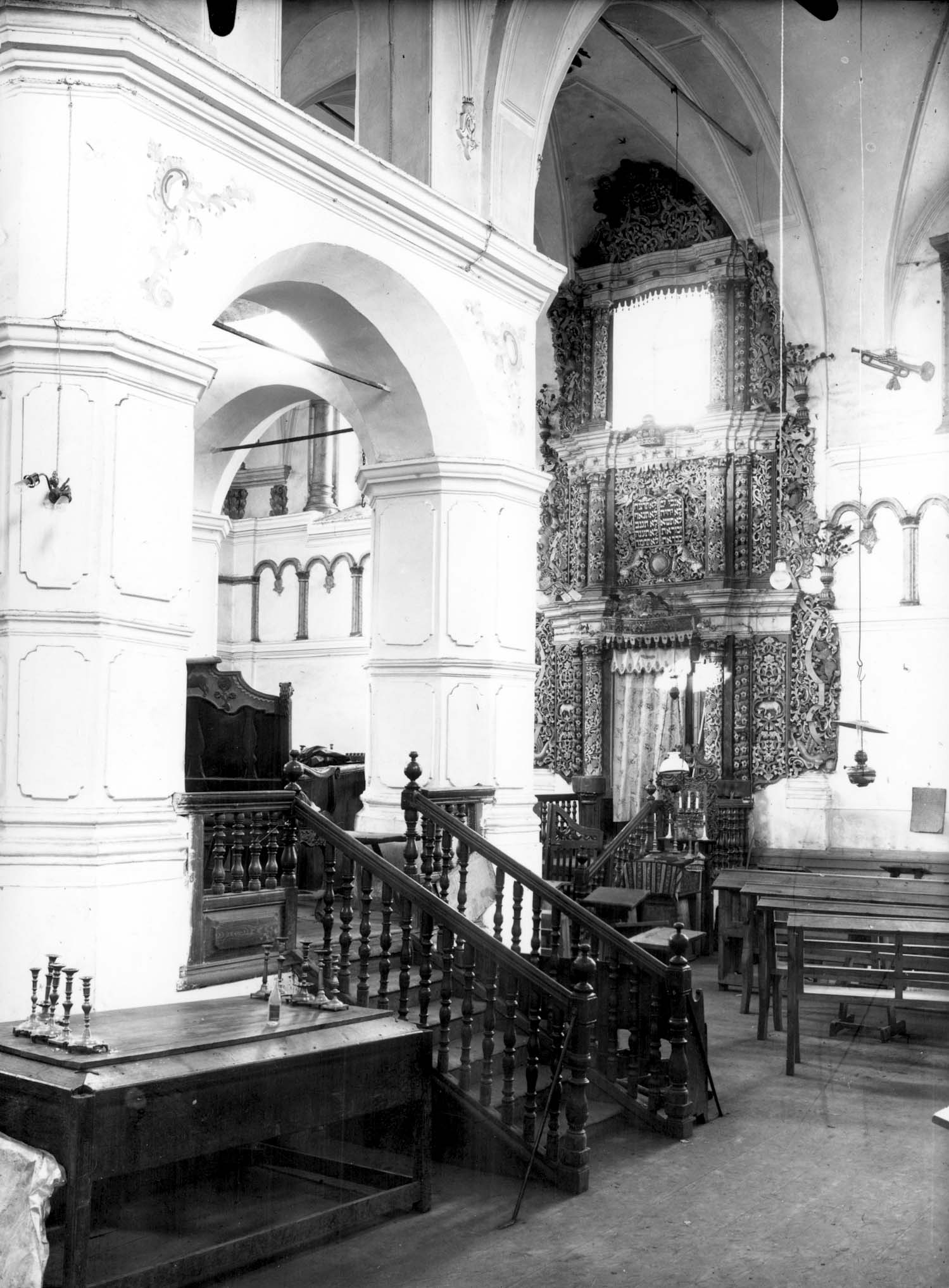 Велика синагога в Мацеїві (тепер Луків Волинської області).